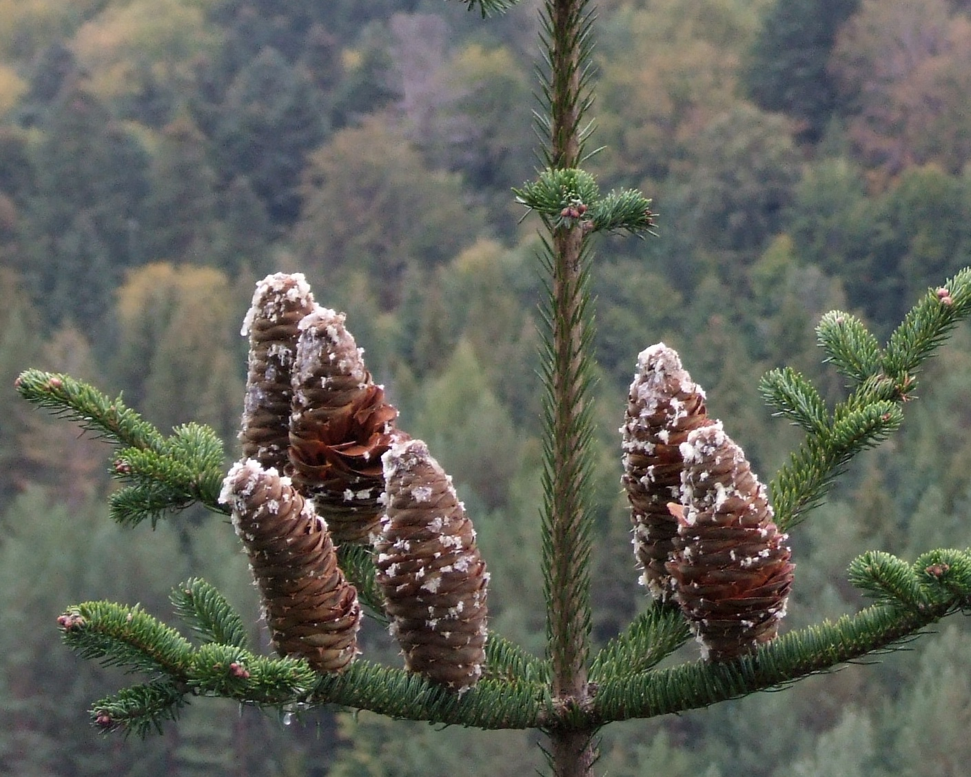 Abies alba (habitat: Pieniny (Nowa Góra (Poland))